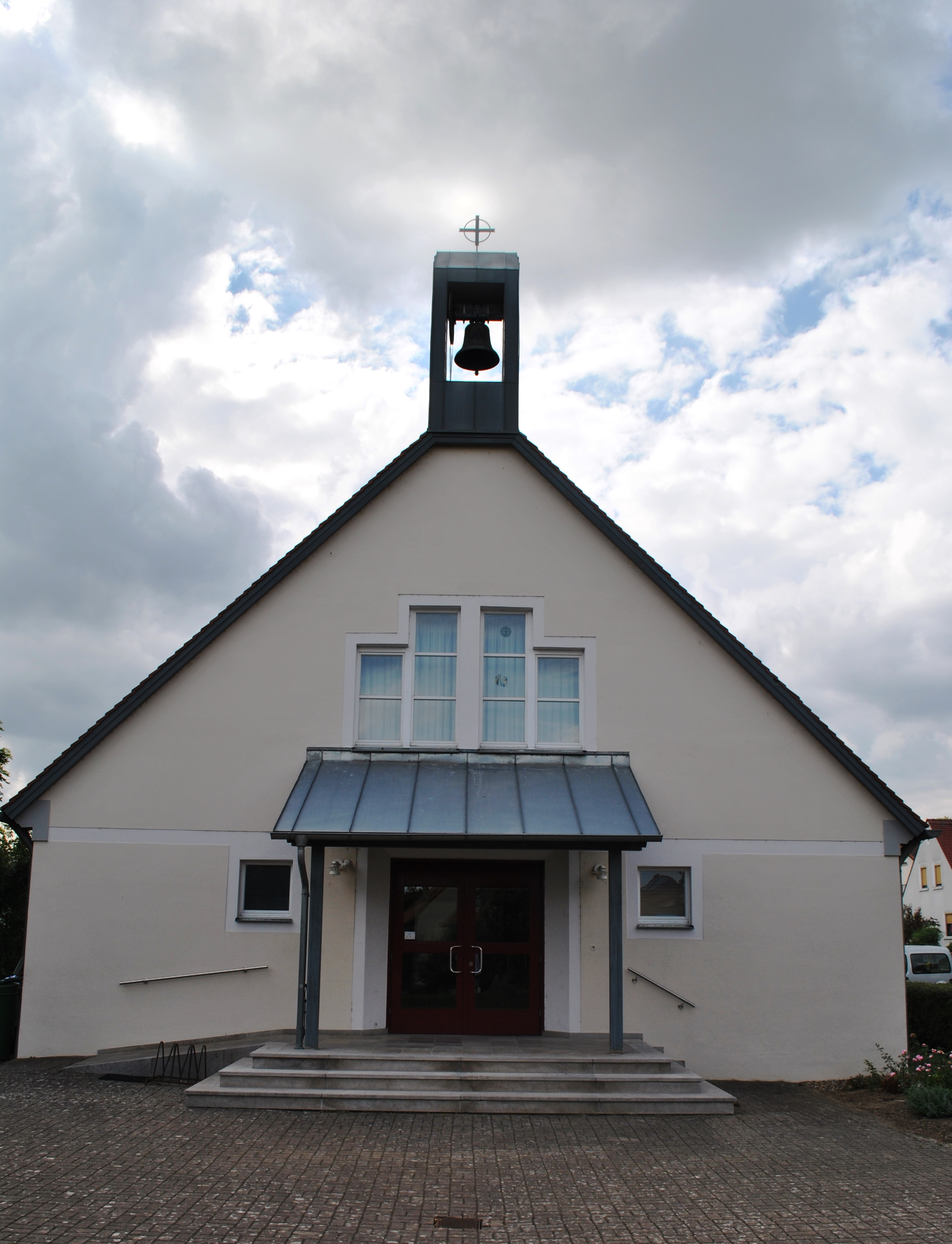 Dreieinigkeitskirche, Evangelische Kirche Dettelbach